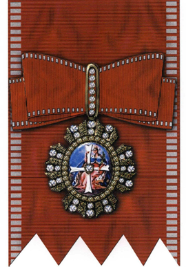 Орден Святой великомученицы Екатерины (Российская Федерация)